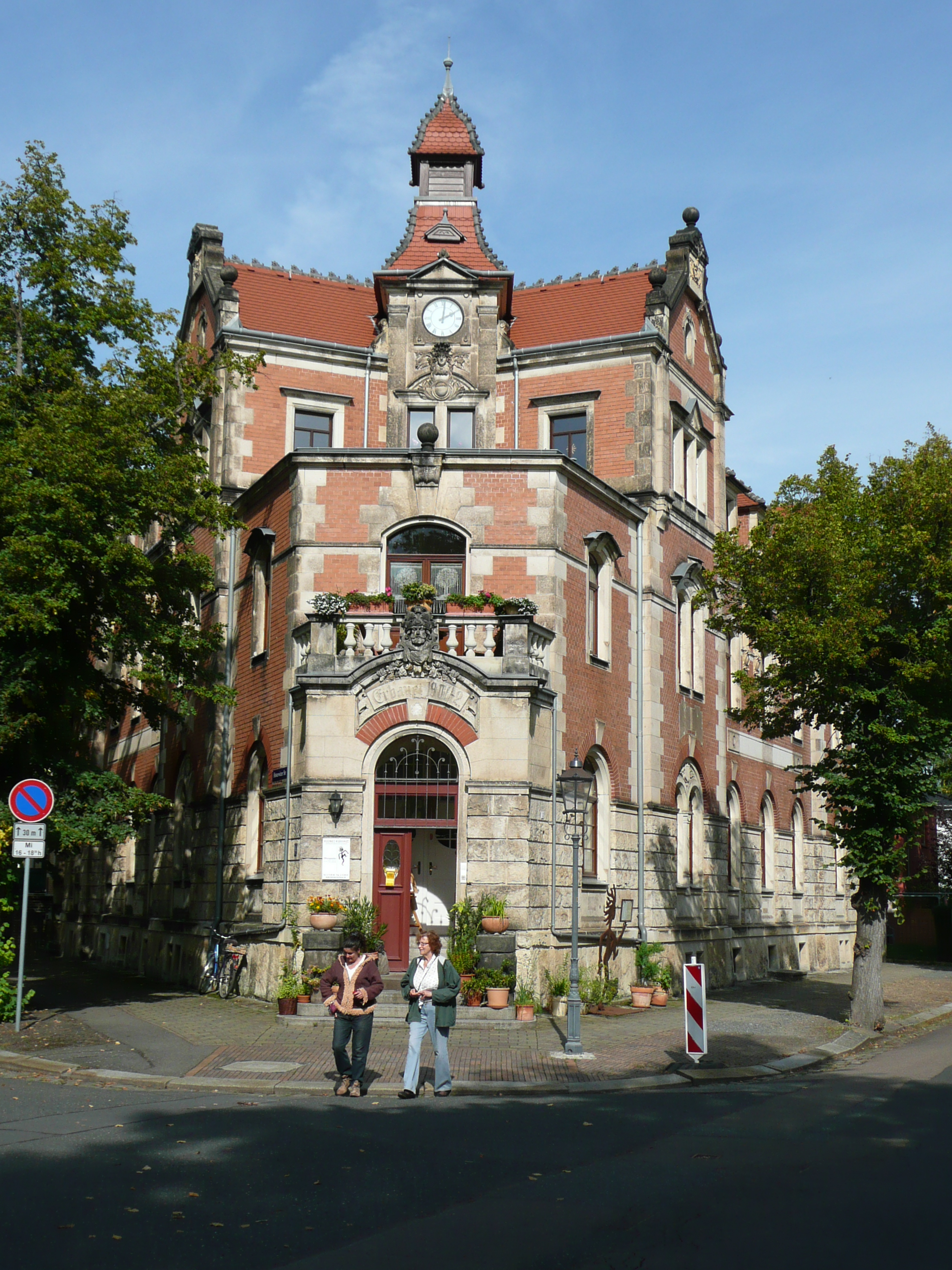 Wohnhaus Kleinzschachwitz Hosterwitzer Straße 2